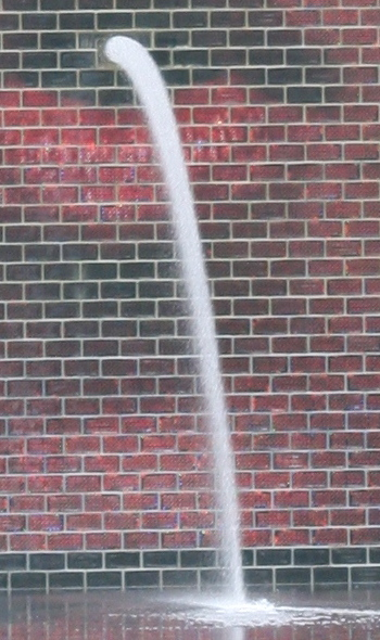 Fountain